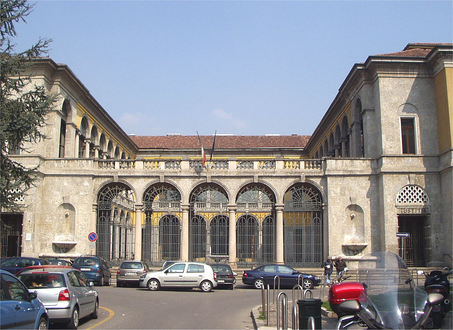 Monza Palazzo di Giustizia in piazza Garibaldi le due fontane che fiancheggiano la facciata, nel cortile c'è un'altra grande fontana circolare al cui centro si erge la tazza in marmo che si intravvede oltre la cancellata